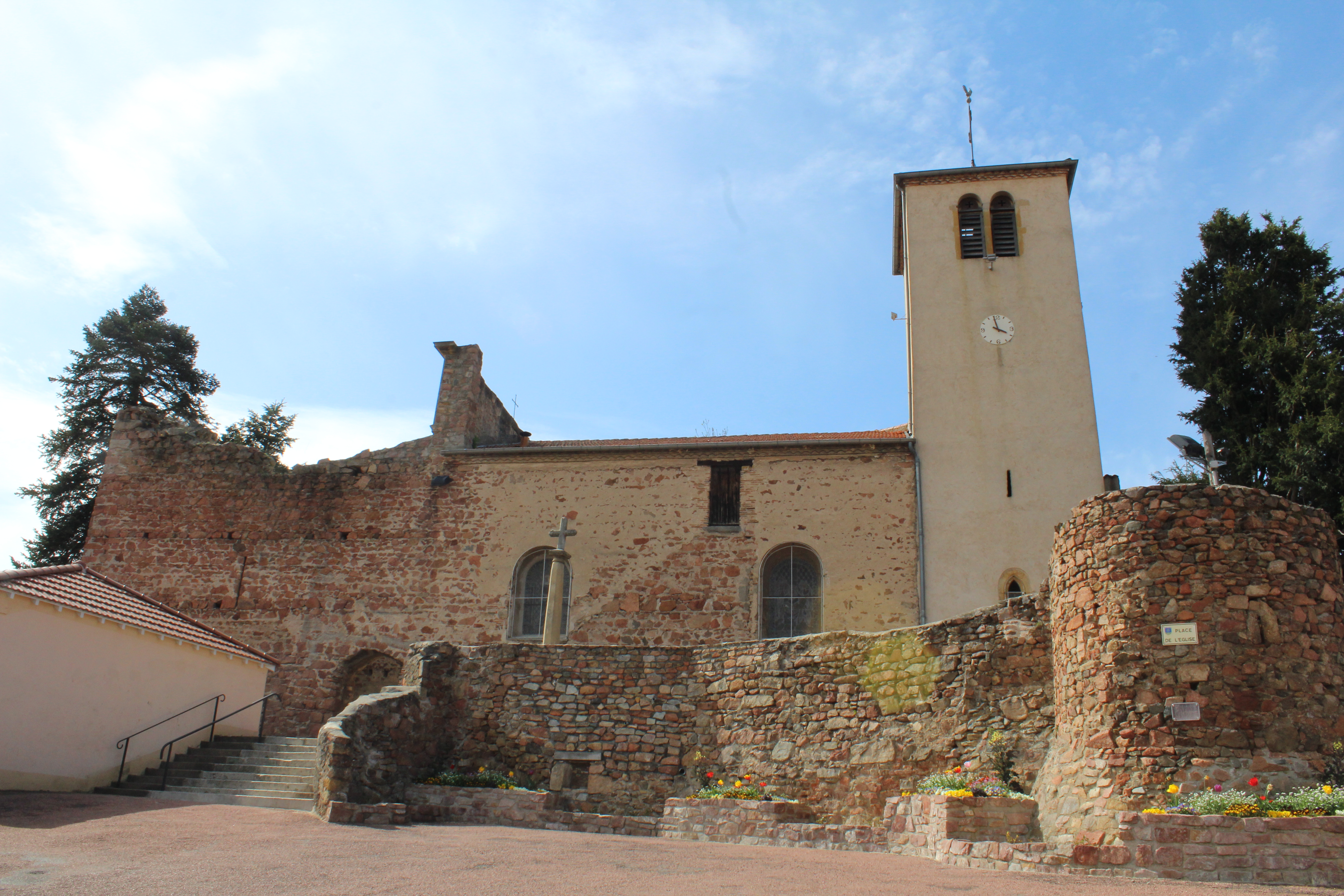 Église Notre-Dame-des-Mariniers de Vernay, Commelle-Vernay.